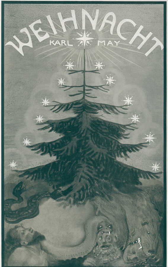 Buchdeckel des Romans „Weihnacht!“ von Karl May. Ausgabe von 1906, gestaltet von Sascha Schneider.